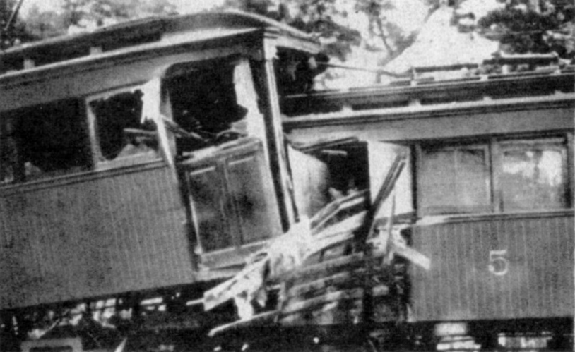 新舞子付近の衝突事故大正8年10月正面衝突の惨事が発生し死者1名を出した